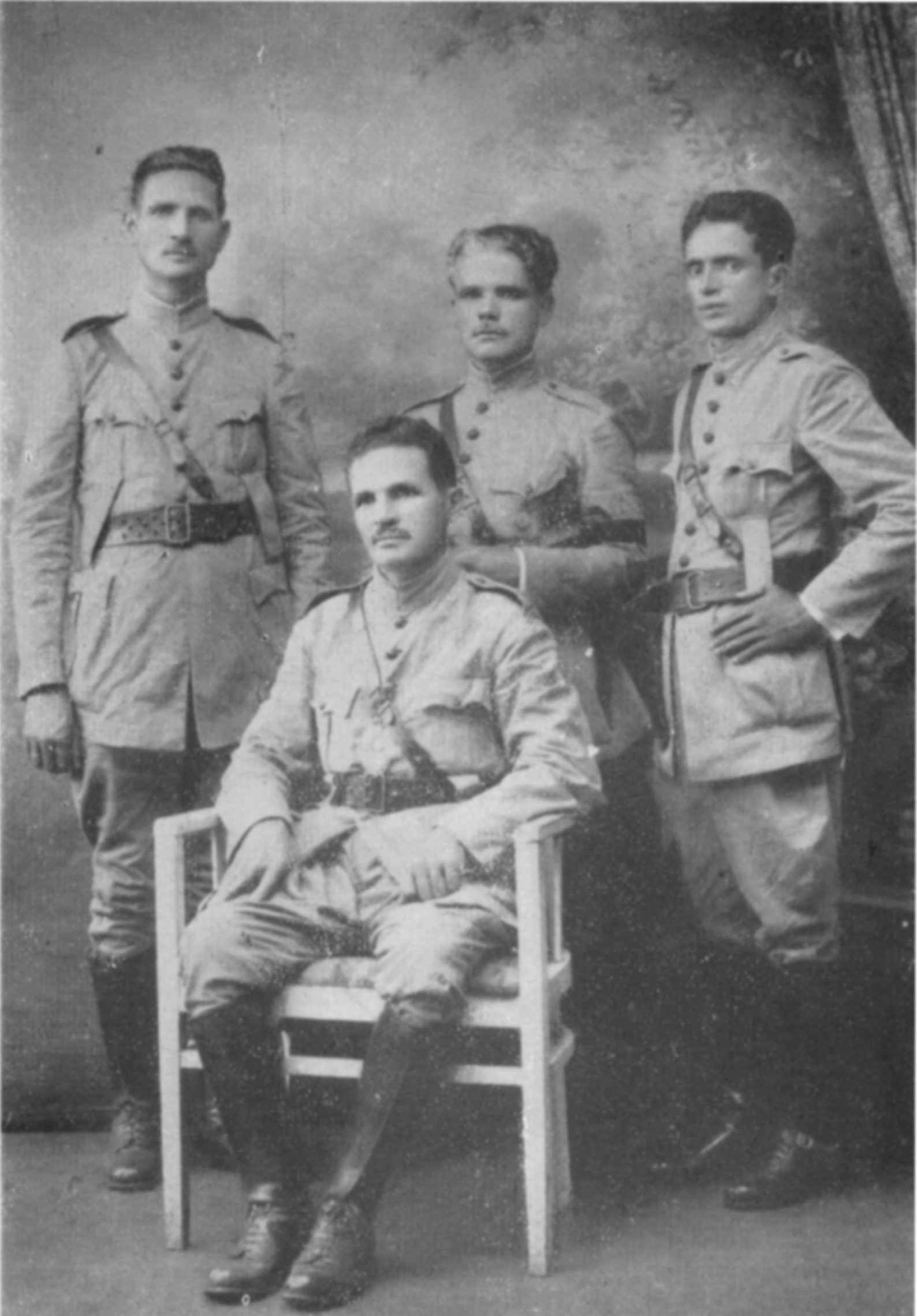 Batalhão Patriótico Chapada Diamantina - tendo à frente o Coronel Horácio de Matos - Alto comando do Batalhão, que veio a derrotar a Coluna Prestes.